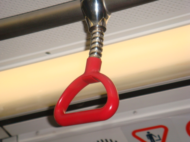 地鐵扶手